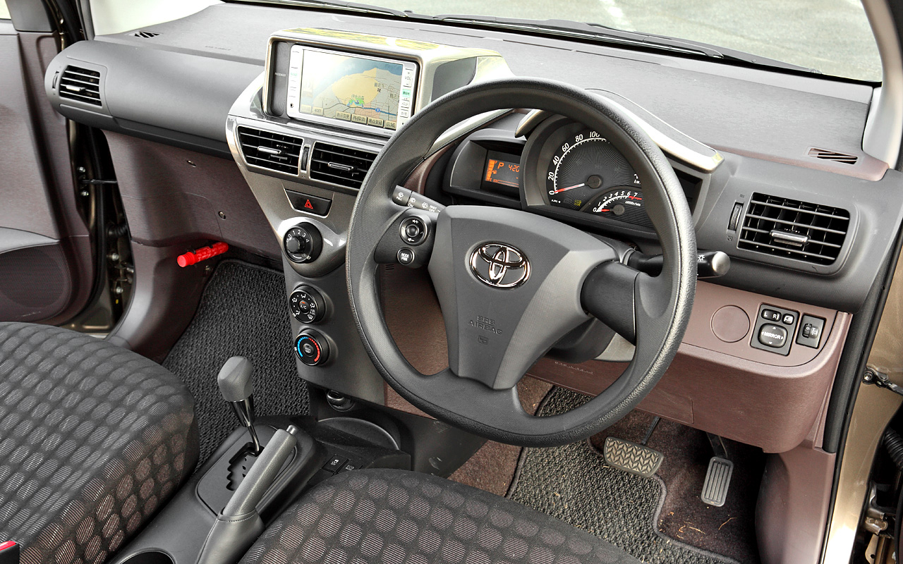 Toyota iQ.